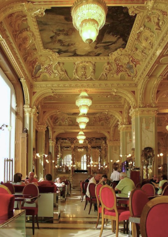 New York Kávéház, Budapest, Hungary